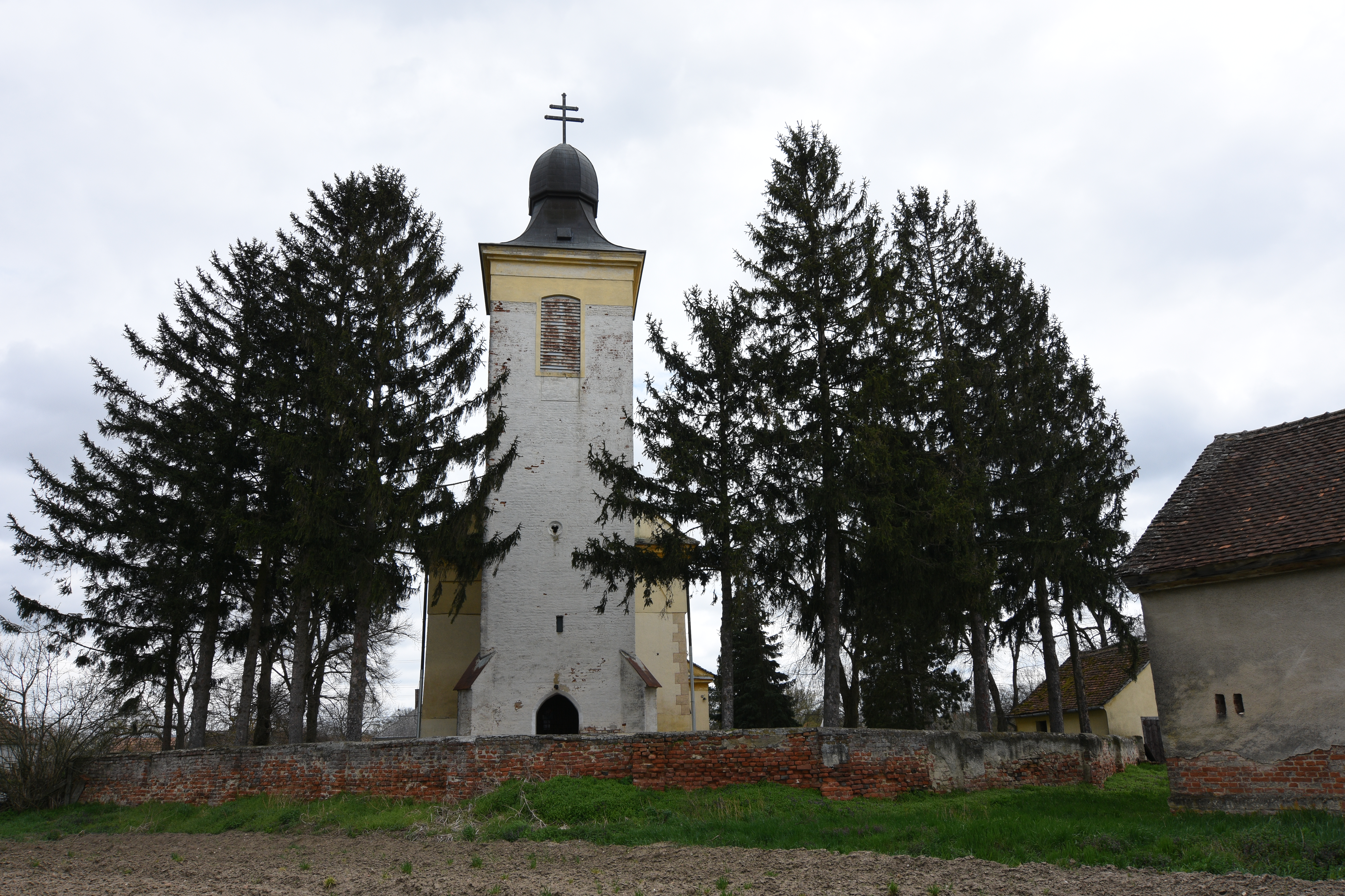 Kirche Egyházashollós